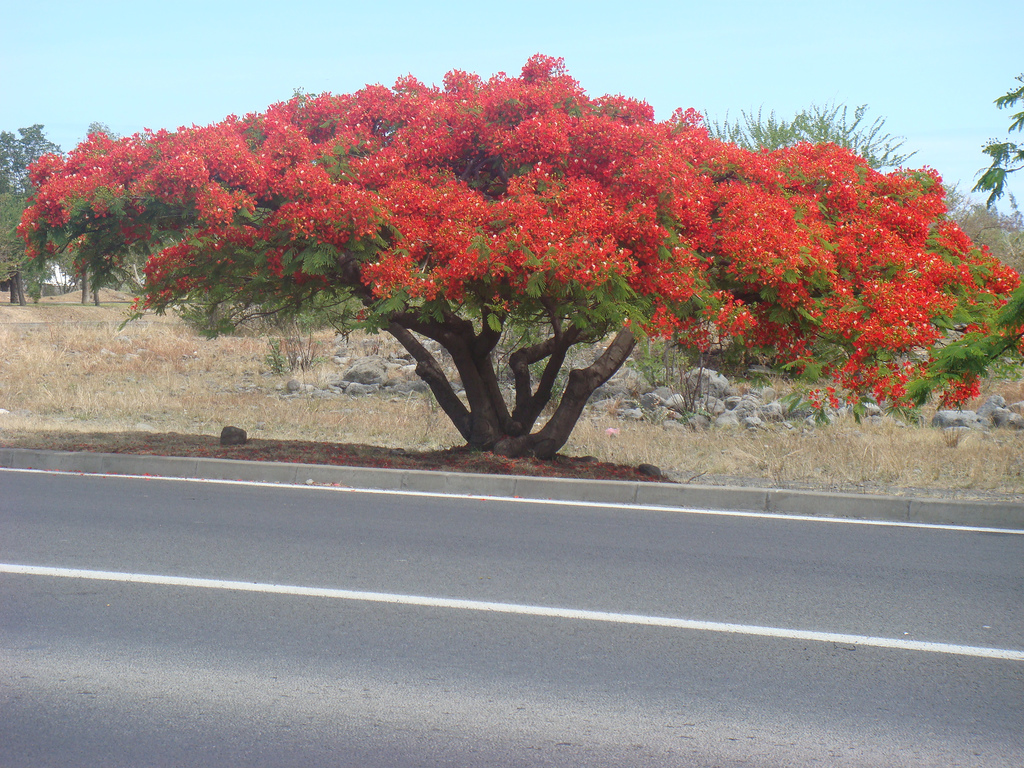 Flamboyant Caesalpinia pulcherrima